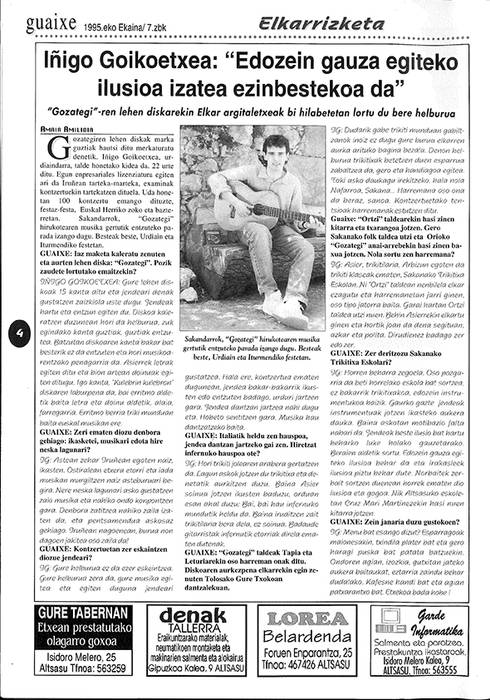 Gozategiko Iñigo Goikoetxea, Guaixe aldizkarian (1995)